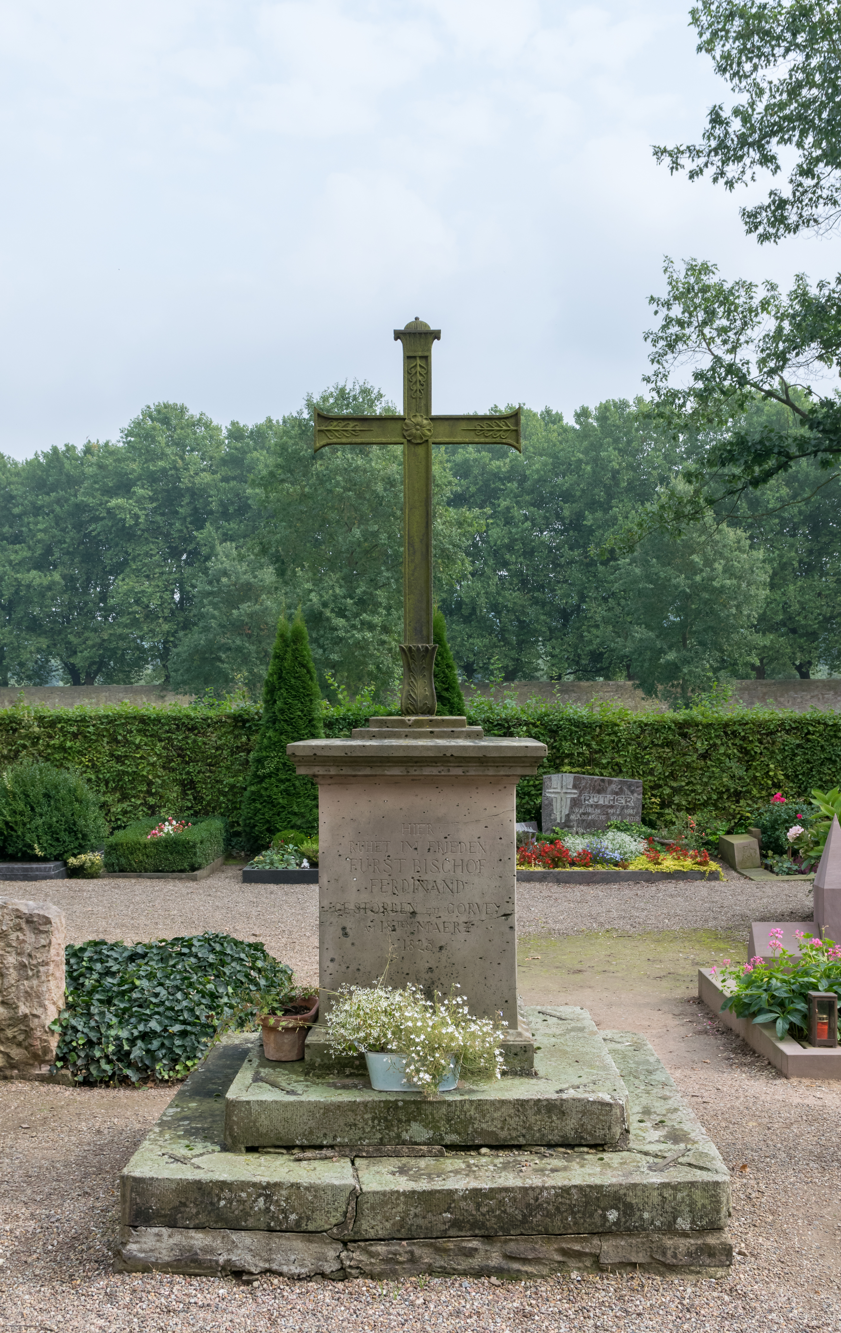 Grab des Fürstbischofs Ferdinand von Lüninck auf dem Corveyer Friedhof, Höxter